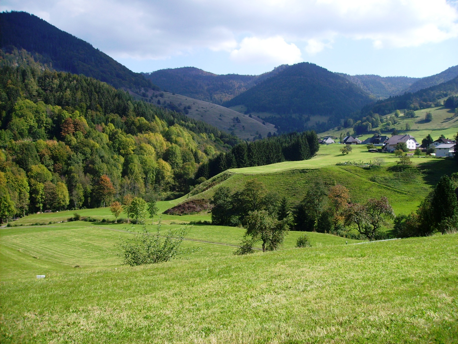 Gletscherkessel Präg Schwarzwald